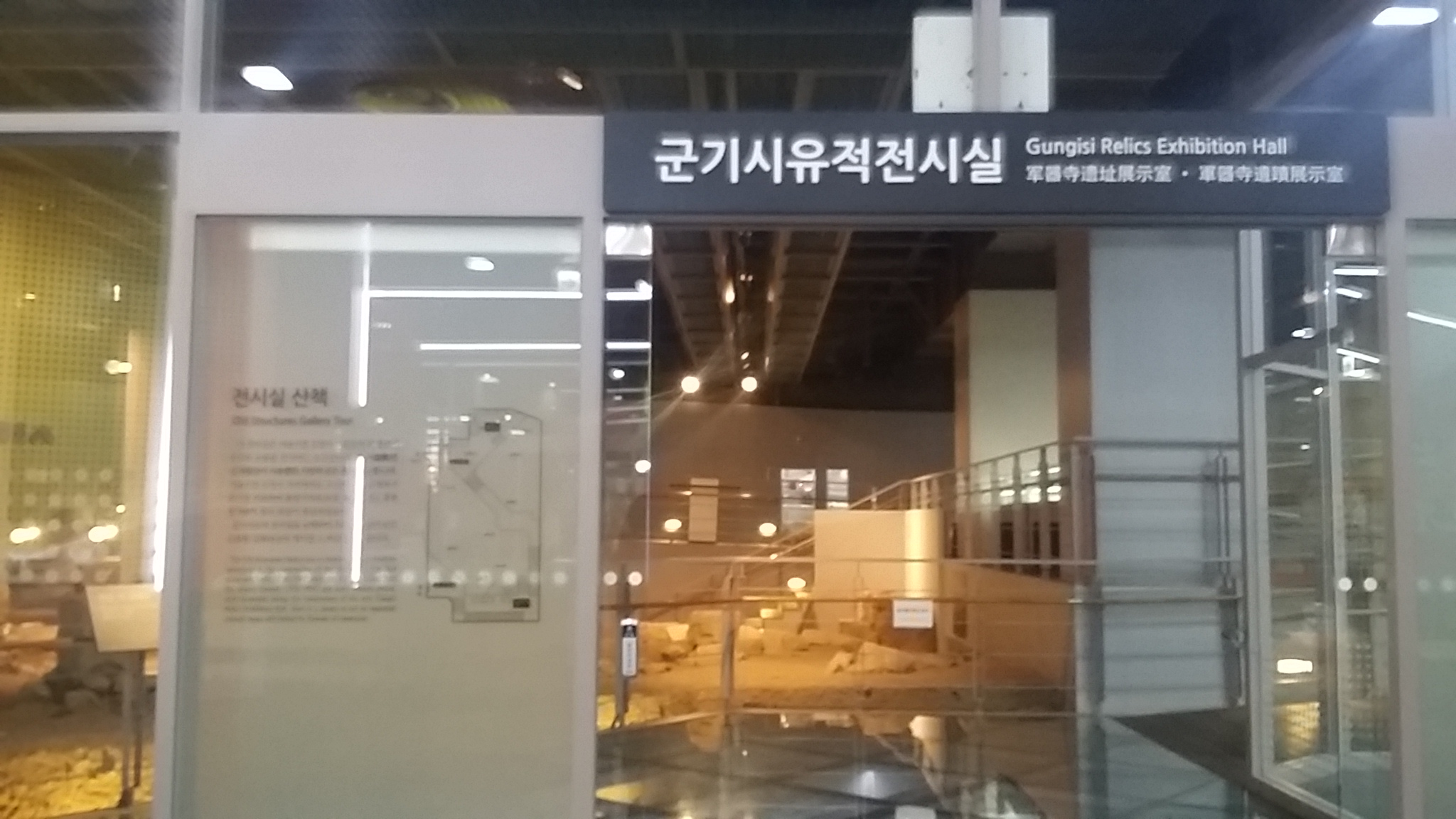 조선말: 서울시민청 군기시유적실